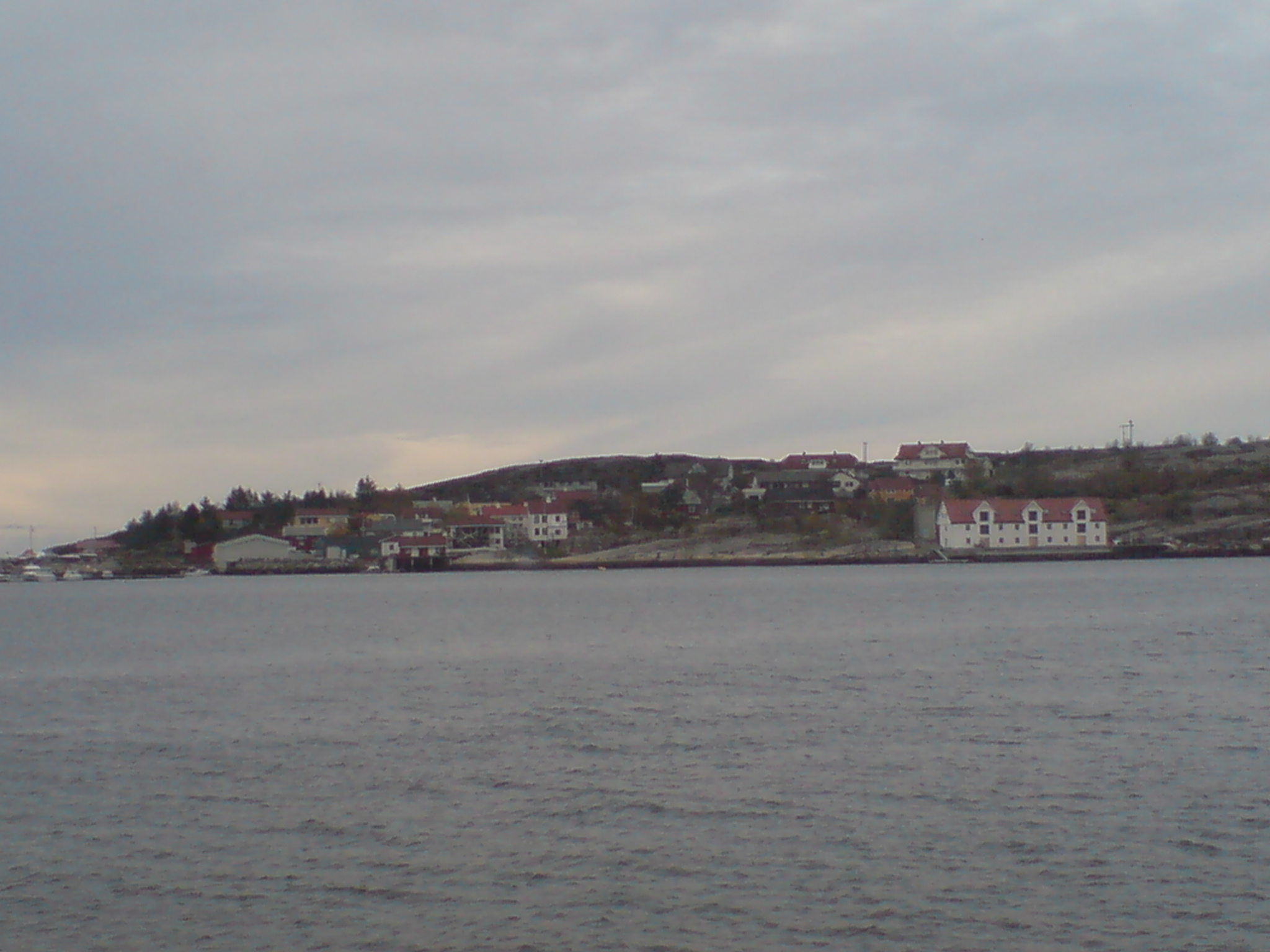 Skorpa sett fra Kystekspressen